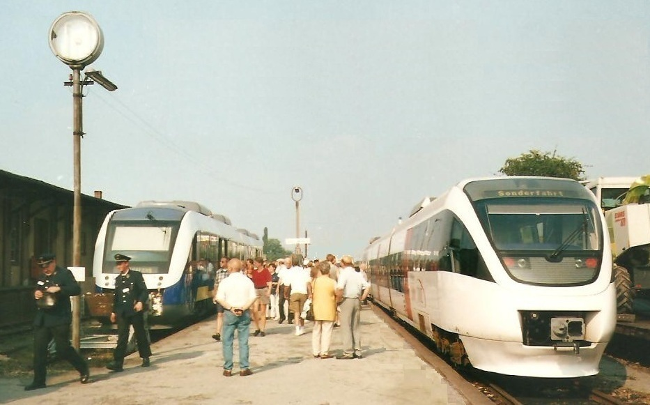 Zwei moderne Triebzüge (Lint der NWB und Talent der OME) beim Jubiläumsfest 100 Jahre Teutoburger Wald-Eisenbahn am Bahnsteig im TWE-Bahnhof Gütersloh Nord.